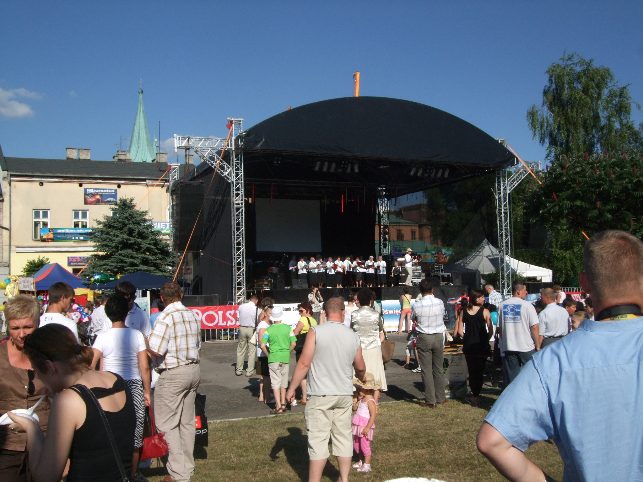 Święto Karpia 2010 w Zatorze. Występ zespołu regionalnego na Rynku.